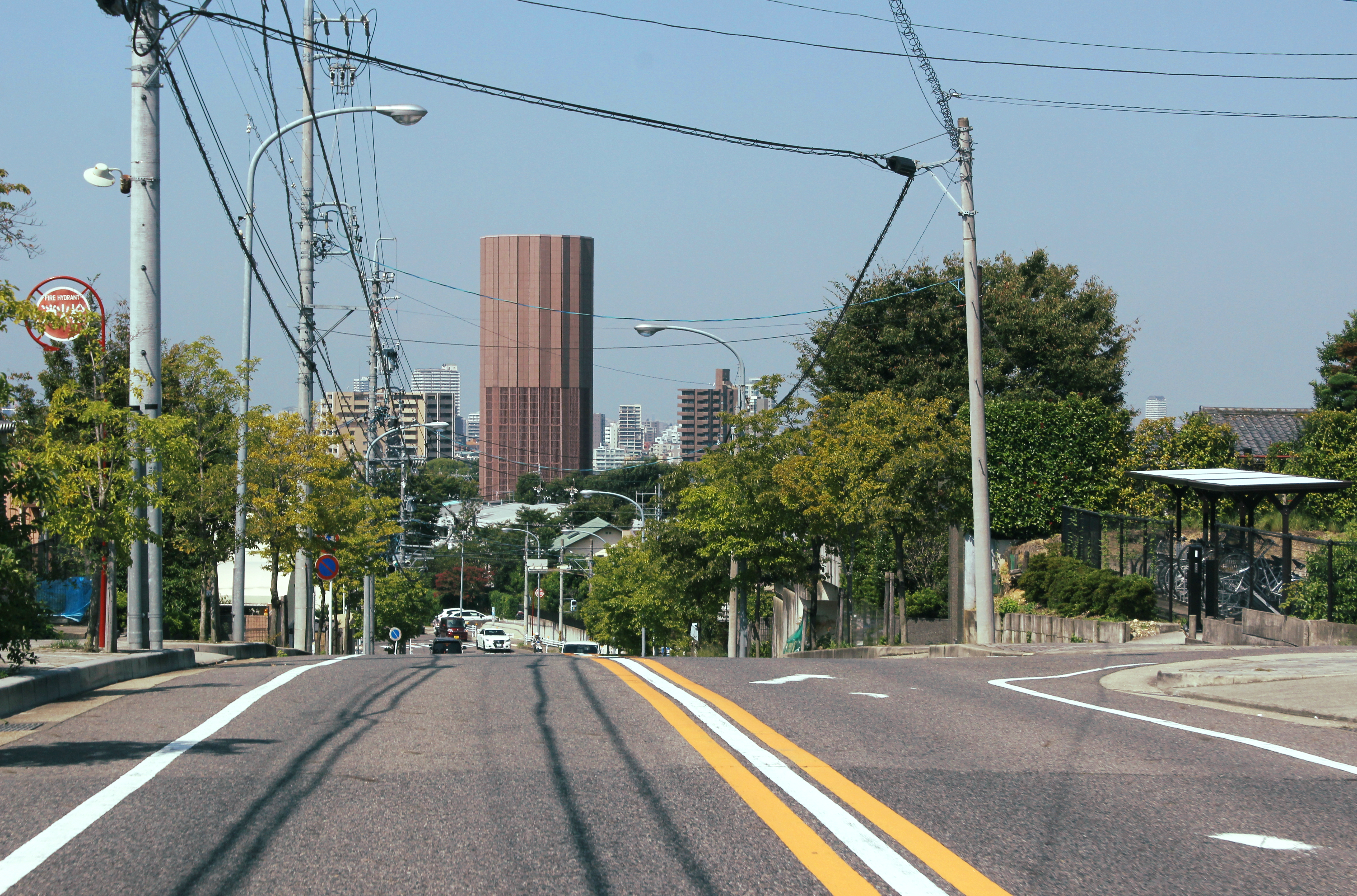 名古屋高速東山トンネルの東山換気所